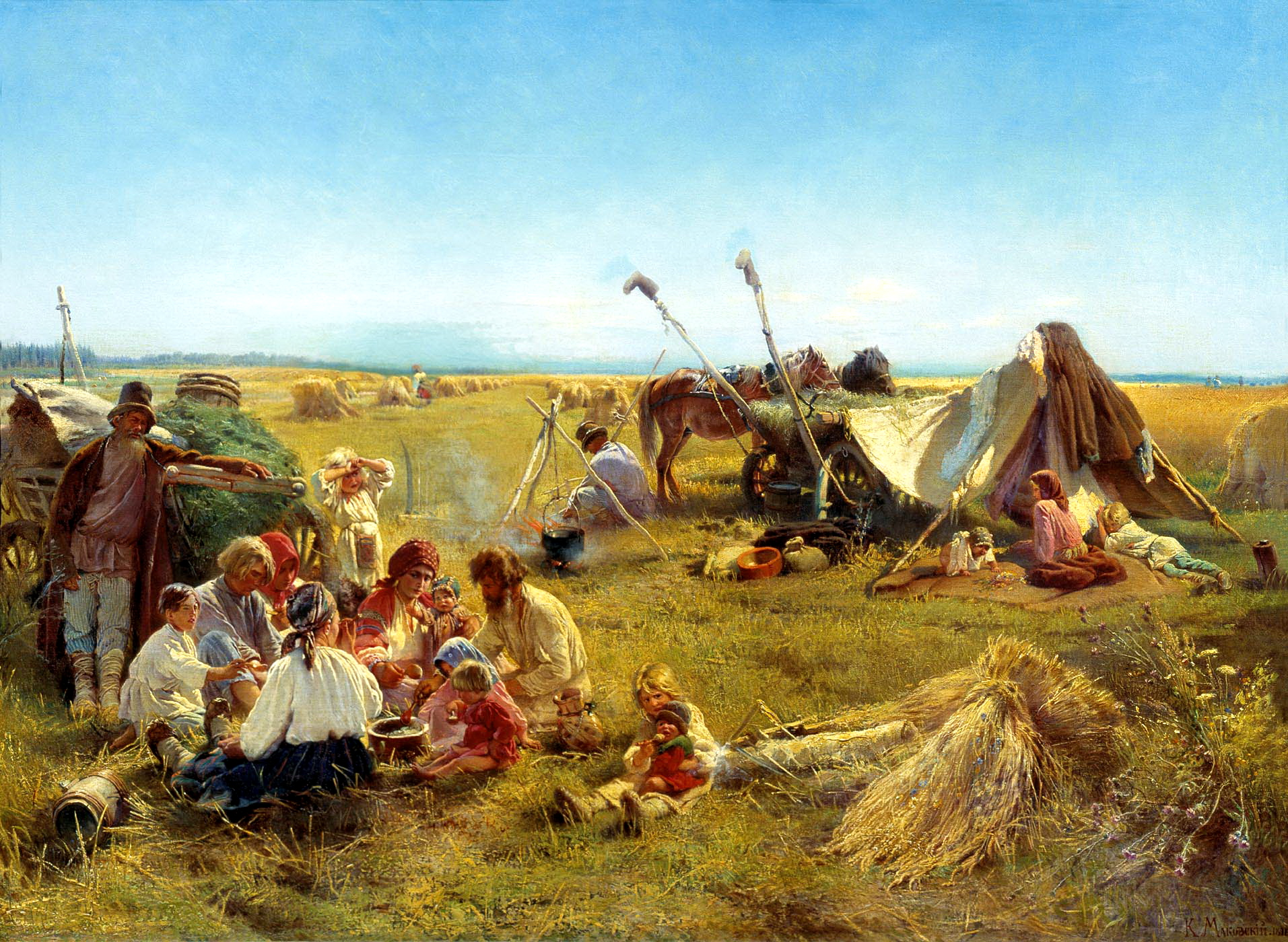 Маковский К. Е., Крестьянский обед в поле. 1871 год. Таганрогская картинная галерея. Таганрог. Холст, масло 119 х 160.